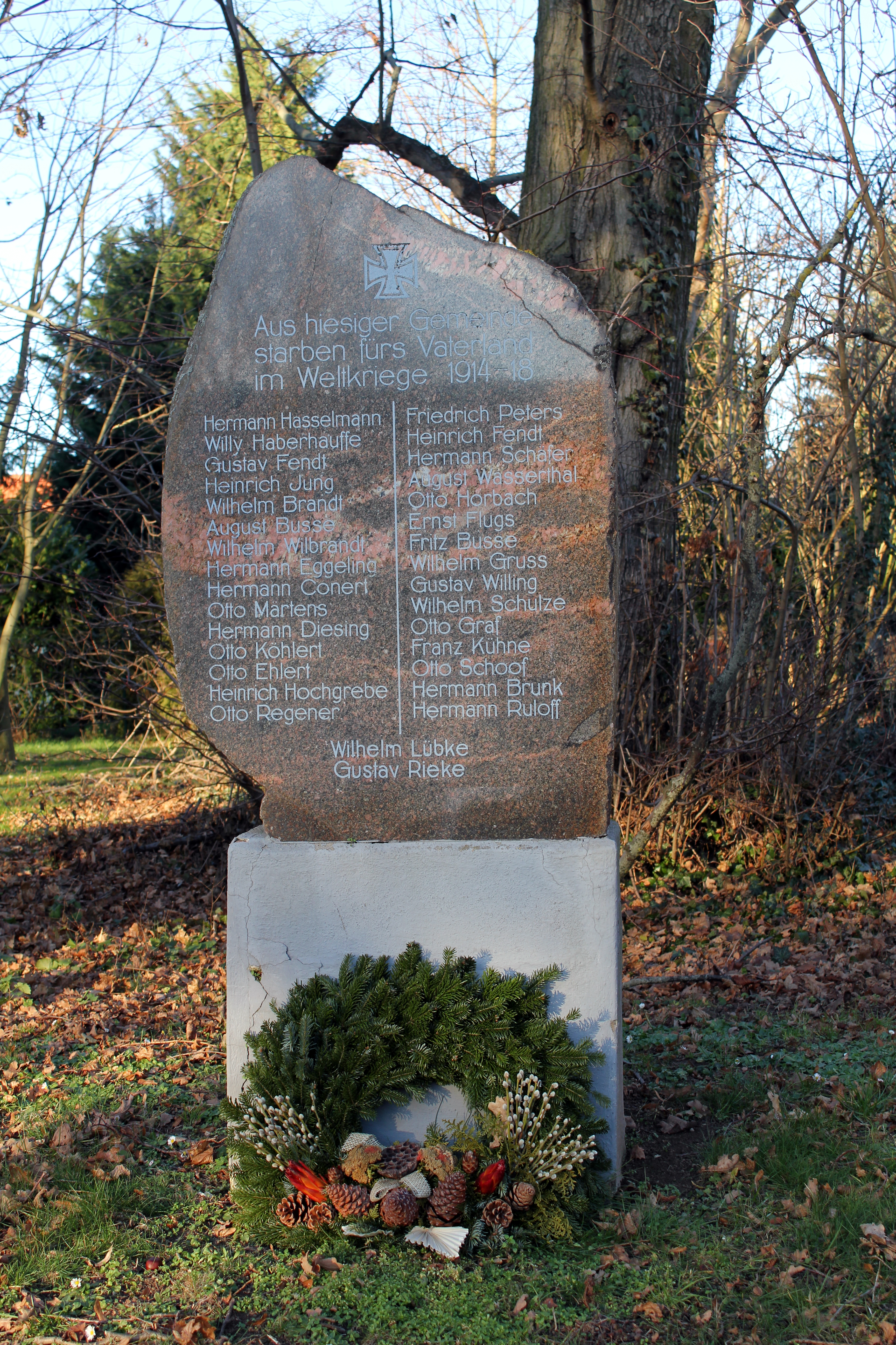 Kriegerdenkmal, Am Kirchenberg vor der Kirche, Ochtmersleben